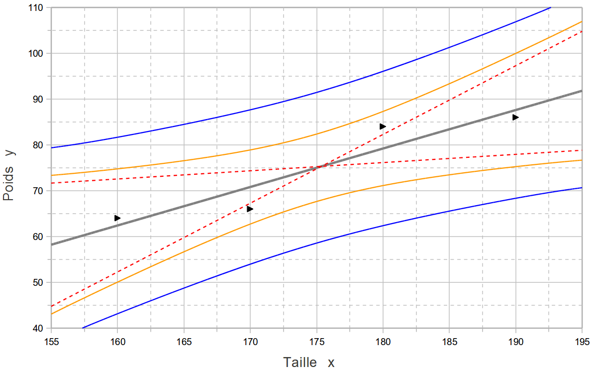 Droite de regression, droites ex­trêmes, enveloppes d'estimation et enveloppes de prédiction.